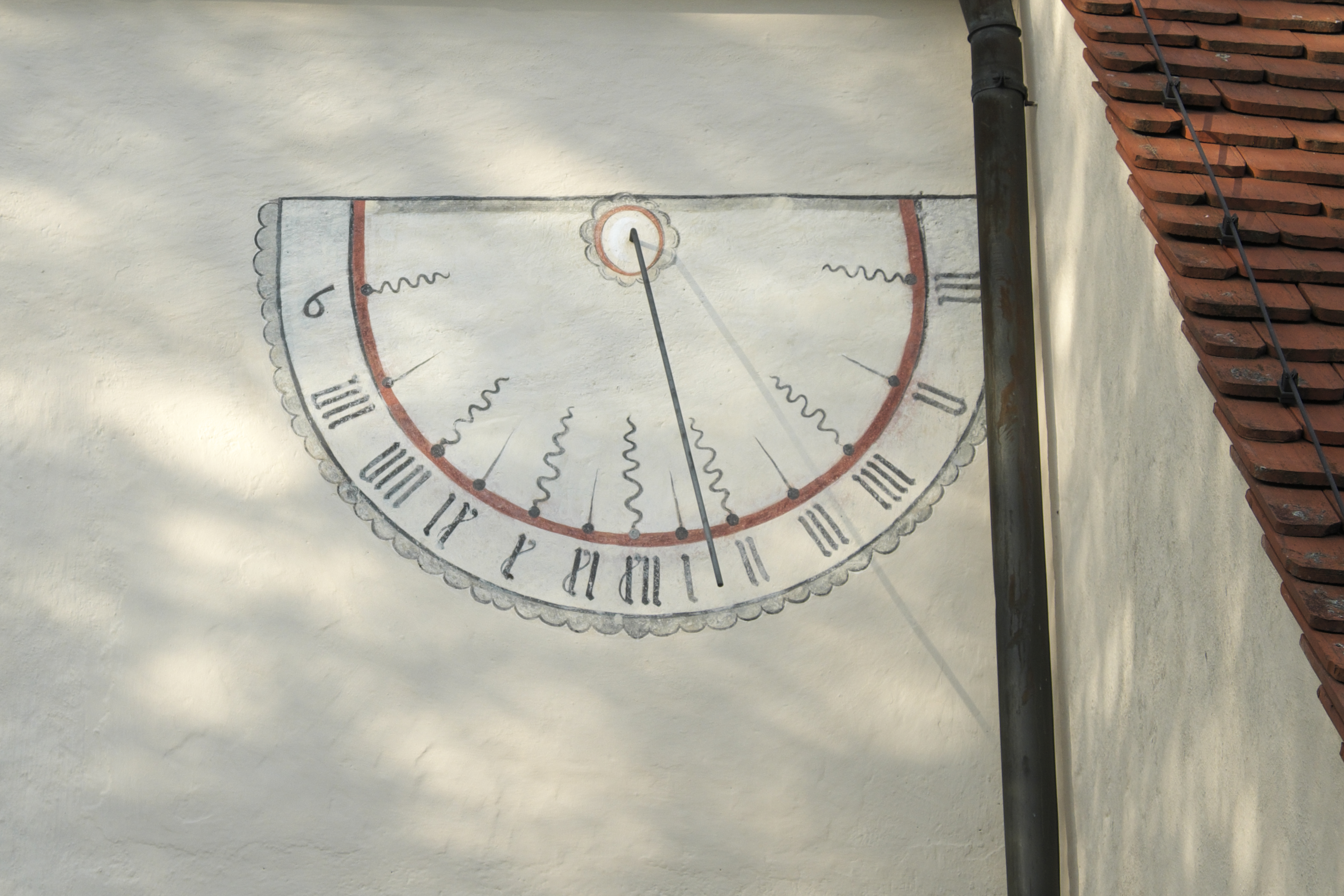 Katholische Filialkirche Mariä Himmelfahrt in Lampferding (Tuntenhausen) im Landkreis Rosenheim (Bayern/Deutschland), Sonnenuhr